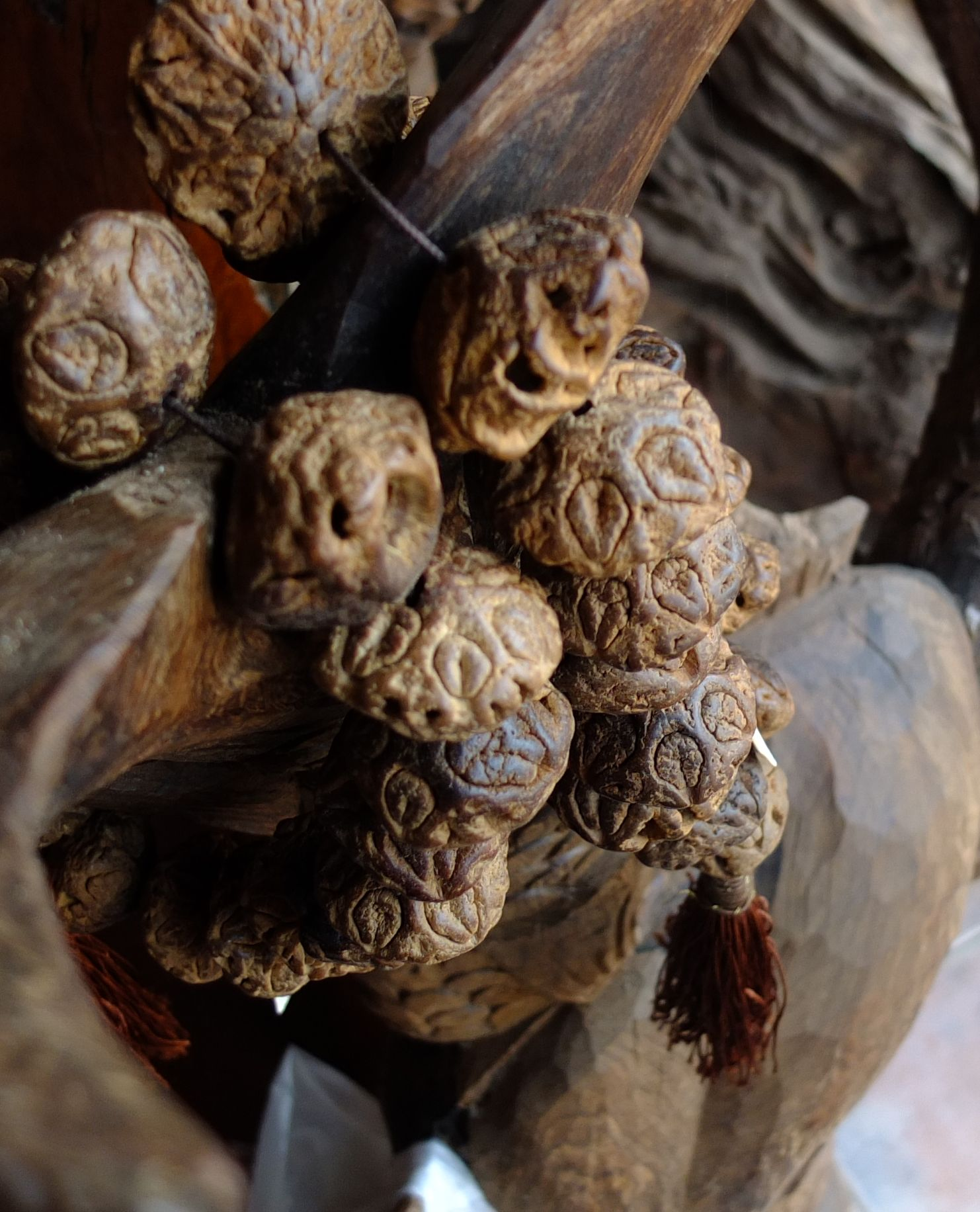 Les noyaux à 5 cases sont des porte-bonheur